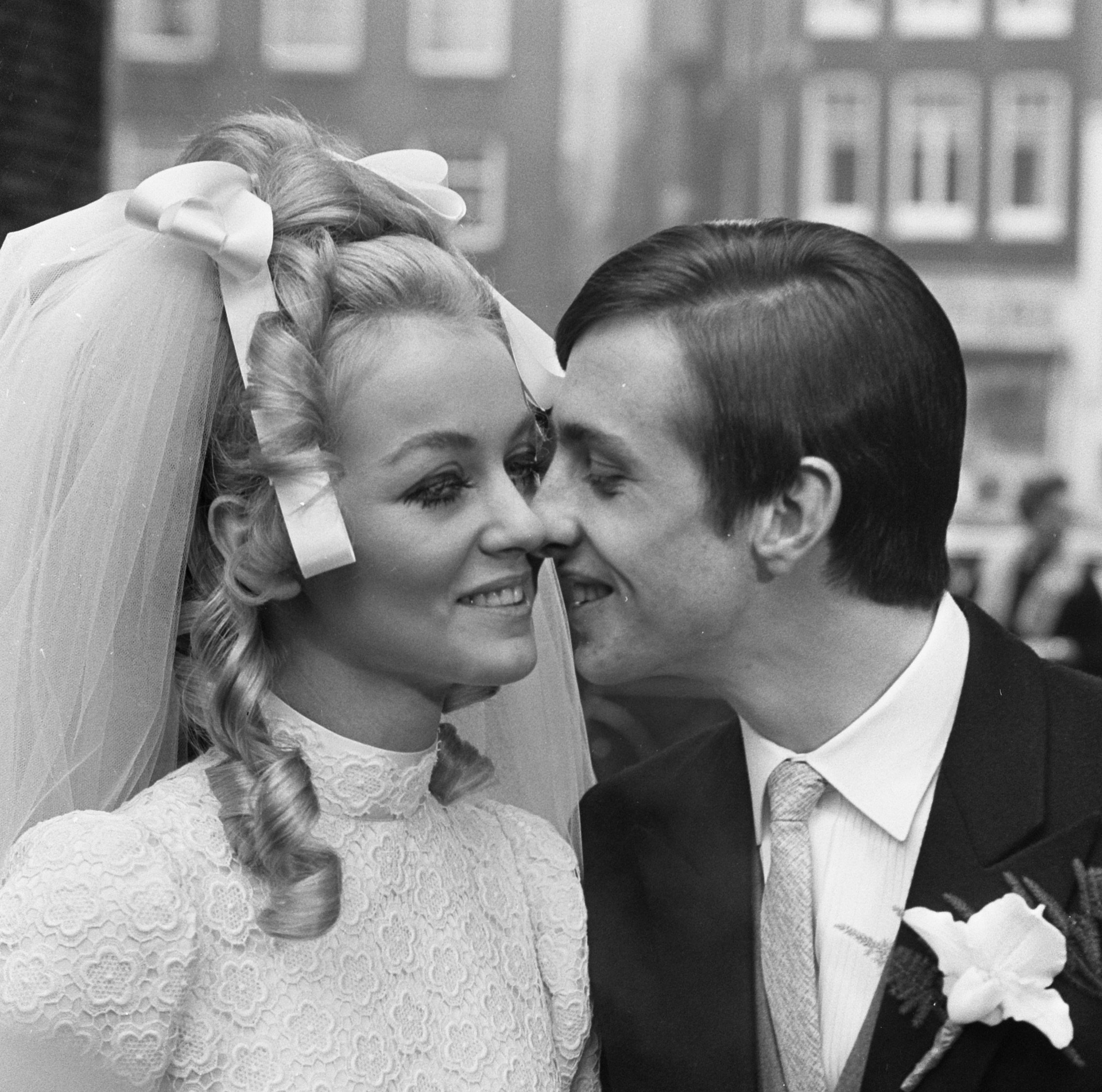 Johan Cruyff getrouwd met Danny Coster Cruyff geeft bruid een zoen